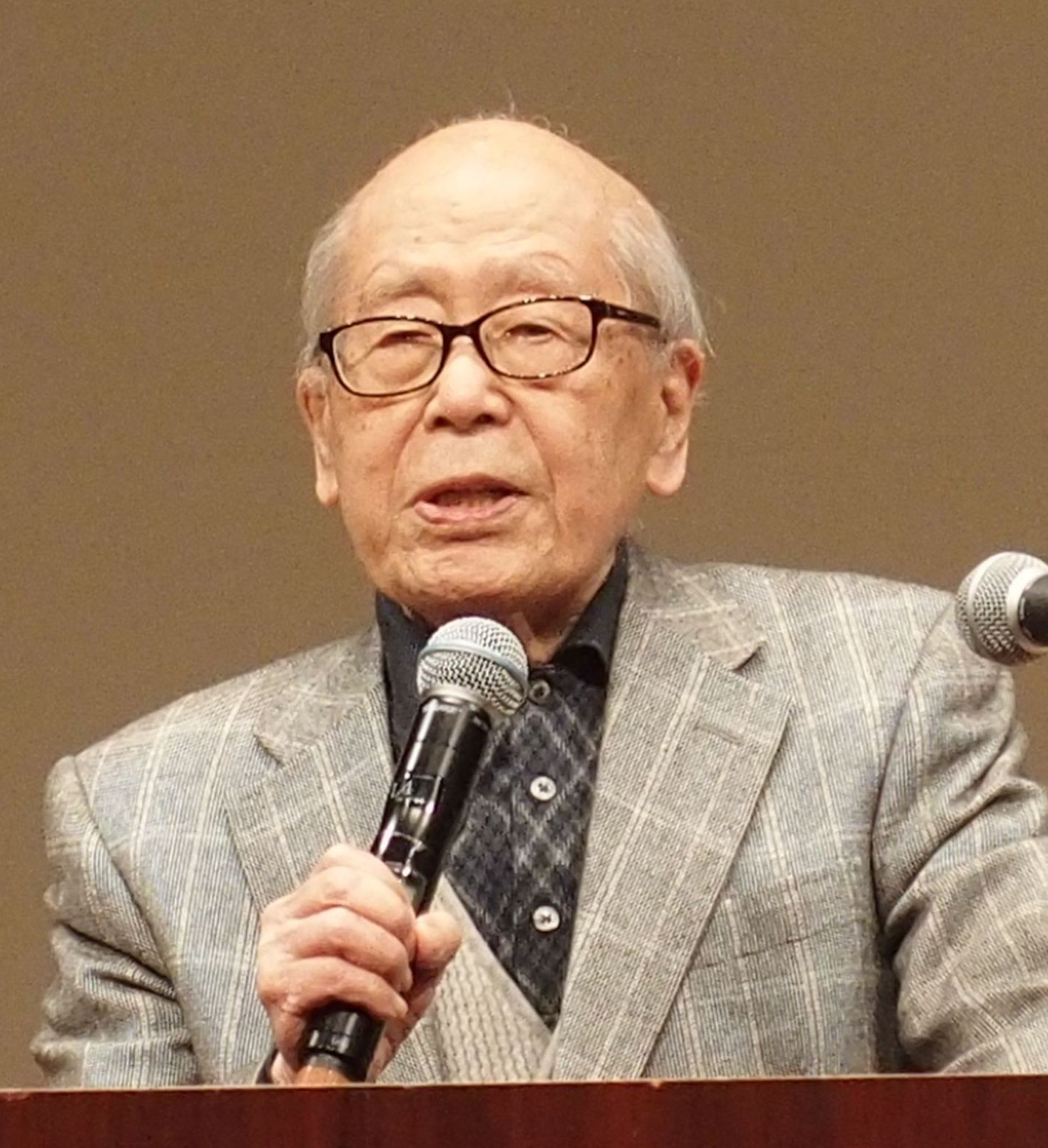 金子兜太 2017年4月